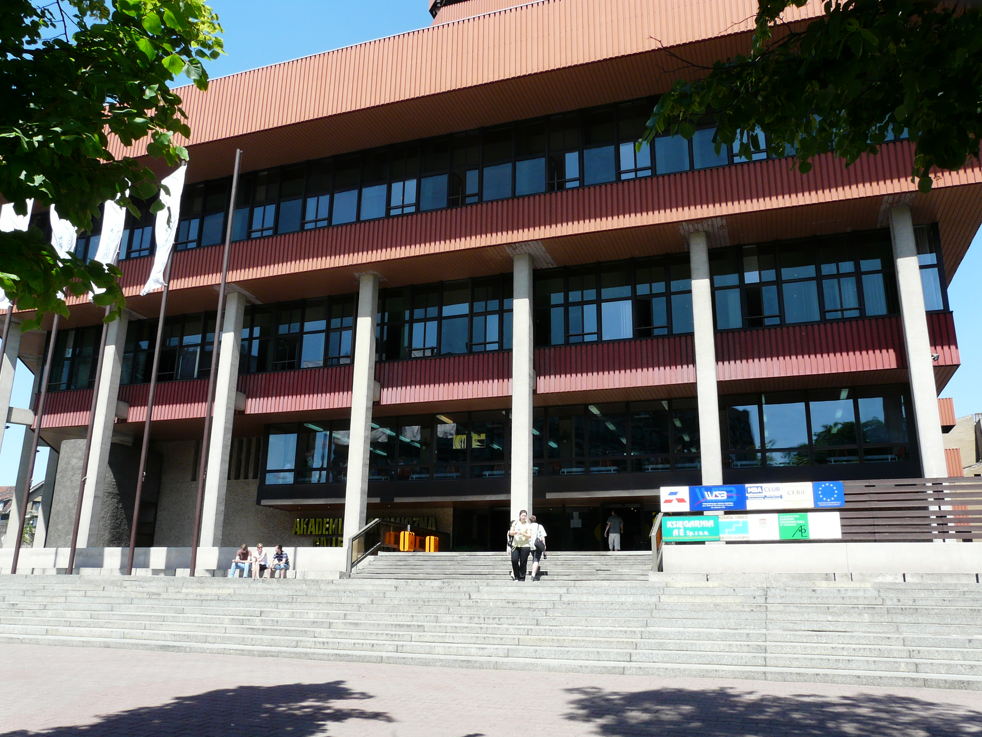 Poznań.